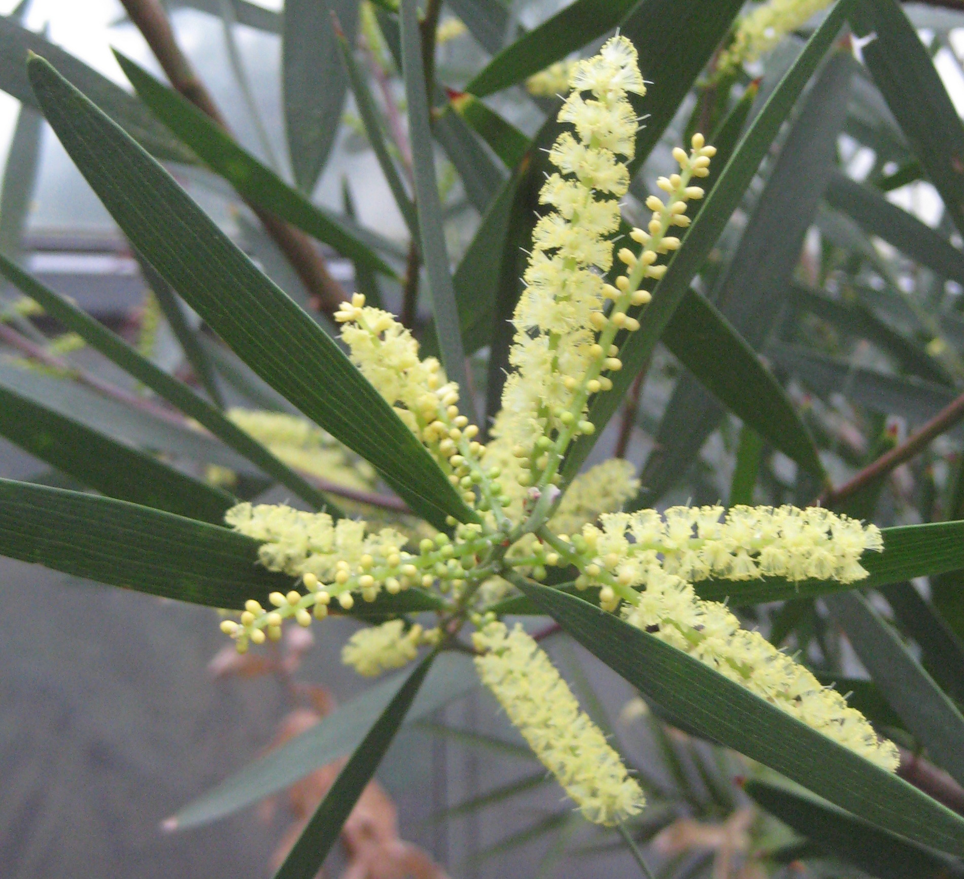 Acacia longifolia im Botanischen Garten Dresden